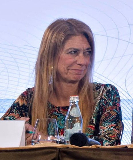 En un encuentro con CEO's de empresas rusas, la Presidenta consideró "muy importante" la reunión con estos ejecutivos, donde se generó un intercambio de ideas entre los hombres de negocios y la jefa de Estado.